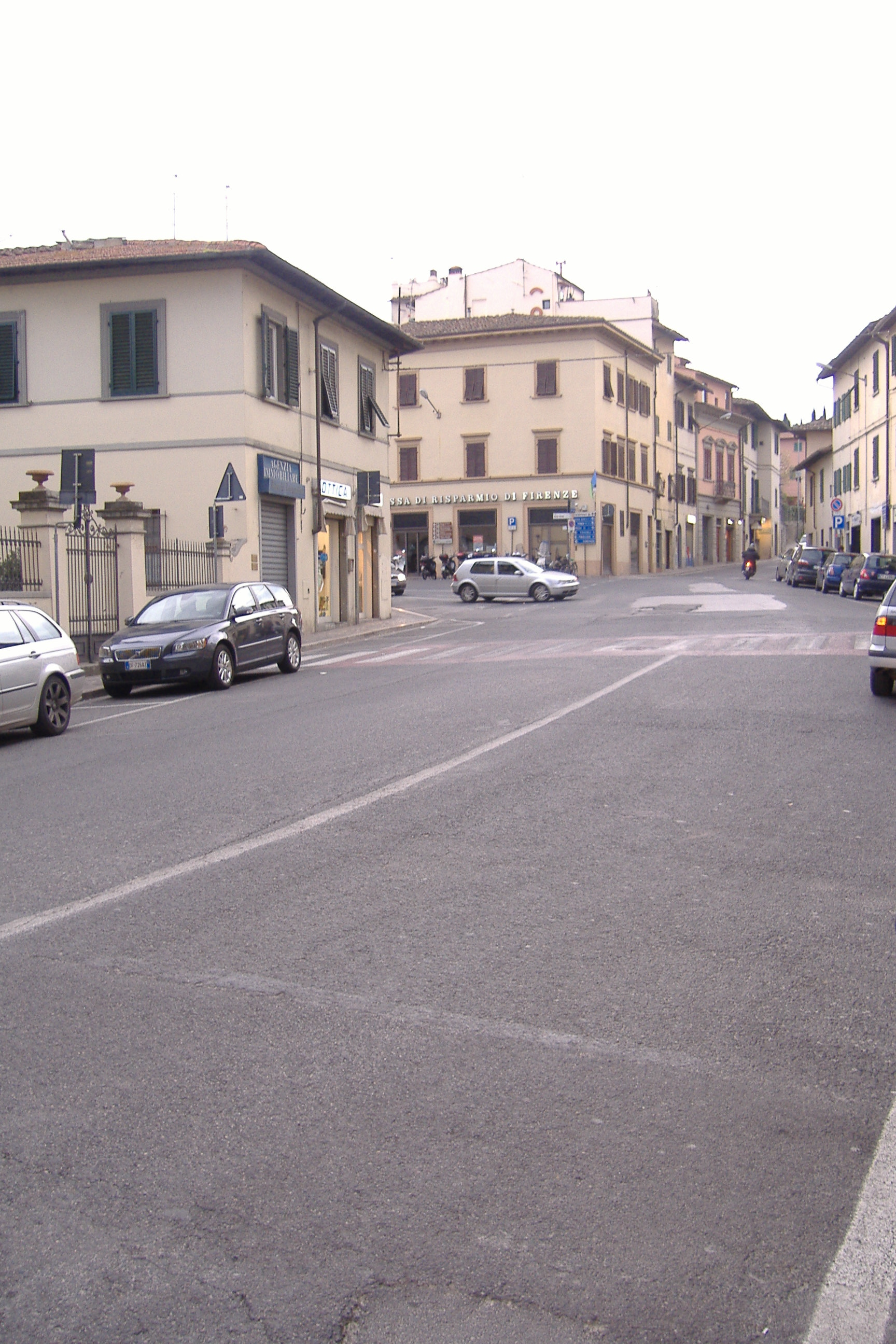 Stefano Nesti, foto personale, Centro di Bagno a Ripoli, Marzo 2007 Licensing Categoria:Bagno a Ripoli